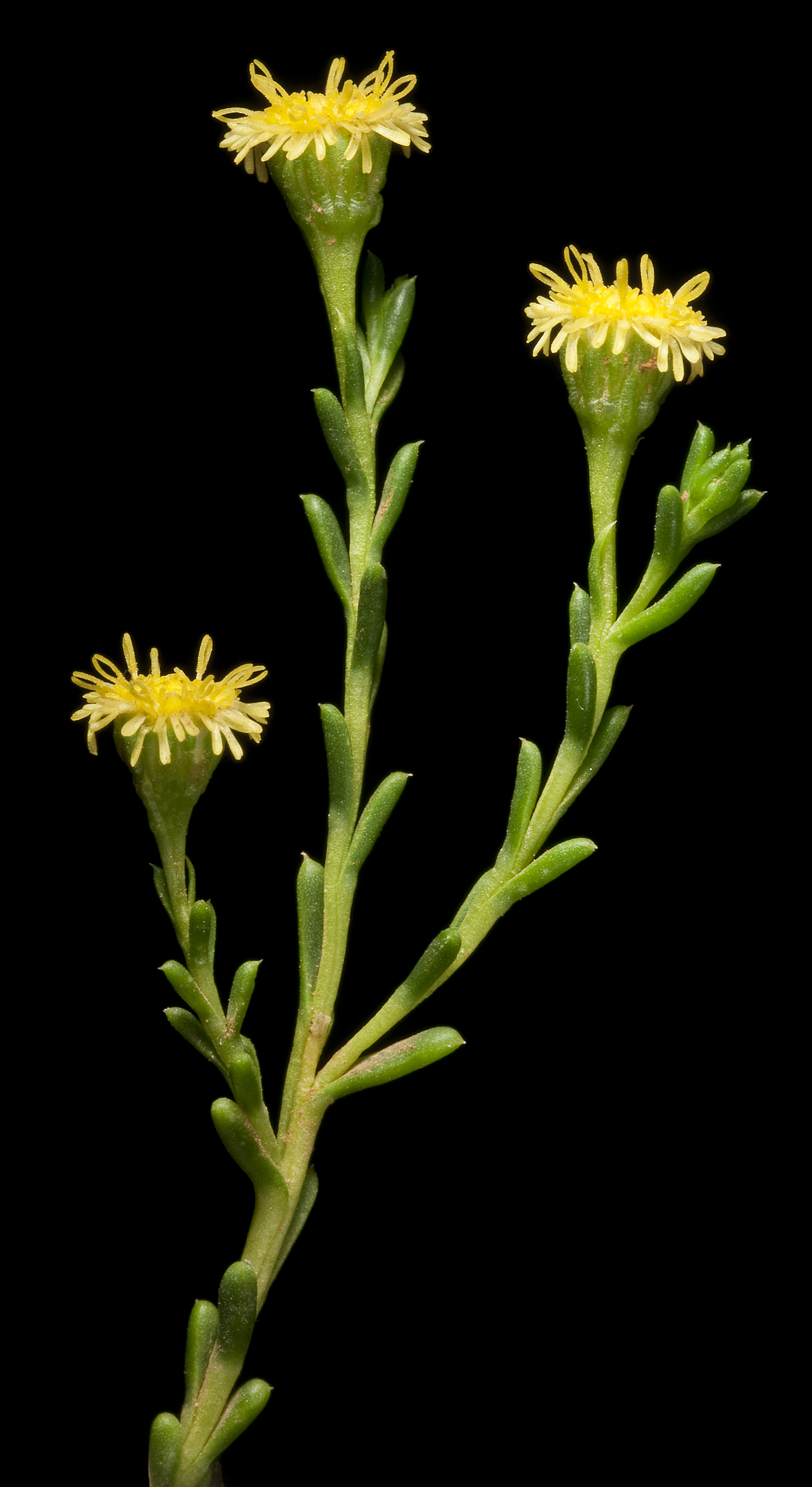 KRT4328